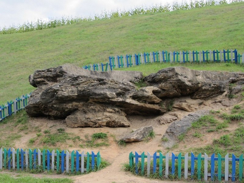 Ледавіковы кангламерат. Валожынскі раён